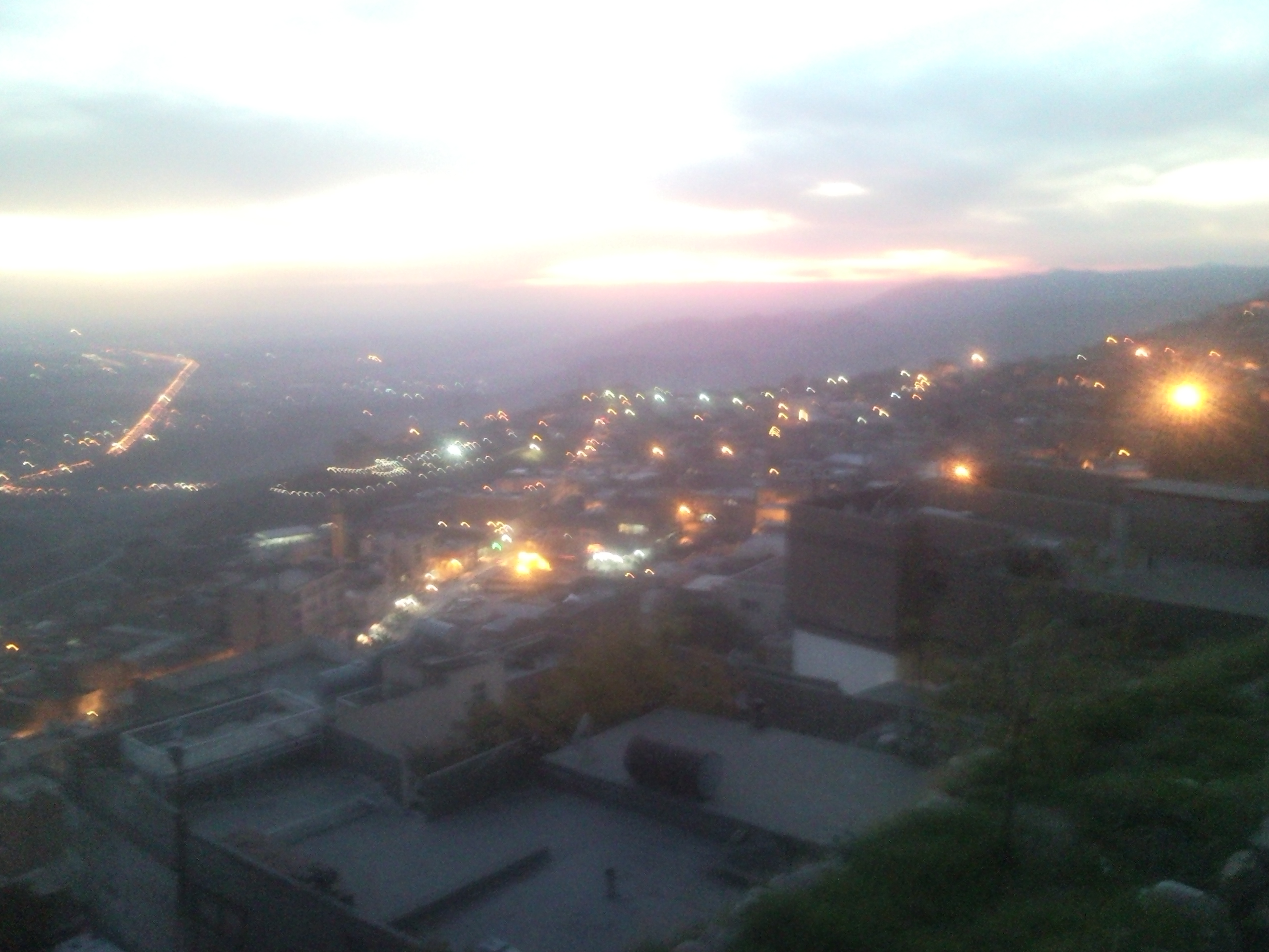 MARDİNDEN KIZILTEPE YOLU